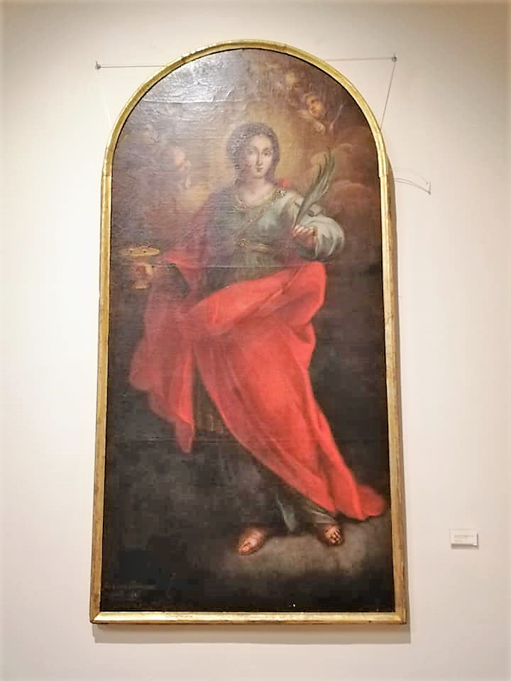 Dipinto.